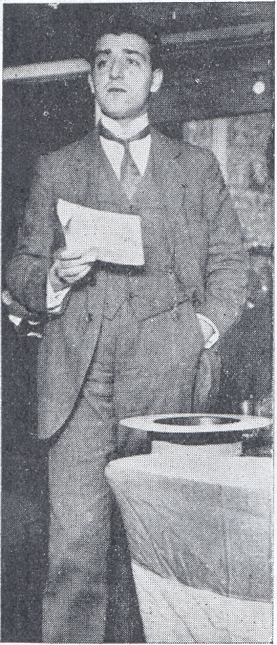 Miguel A. Paez Formoso dirigiéndose a los integrantes de una Asamblea del Partido Nacional de Uruguay, llevada a cabo en 1912 en el local de la Sociedad Francesa (Uruguay).